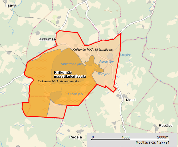 Kirikumäe MKA kaart. Põhineb Maa-ameti kaardil.